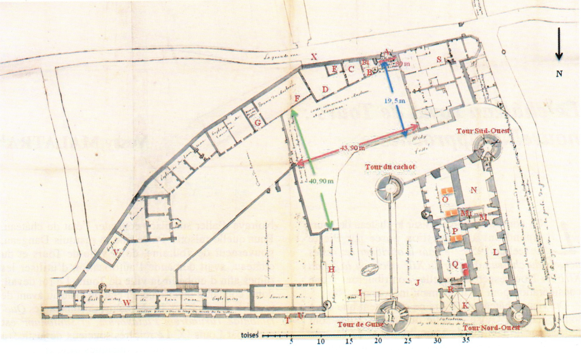 Plan du château de Tours établi par Daniel Masses, architecte - Publié en 1671 - Collection E. C. de Clairembault 963, f. 267 - Bibliothèque nationale de Paris (Archives nationales CP-01-1905)